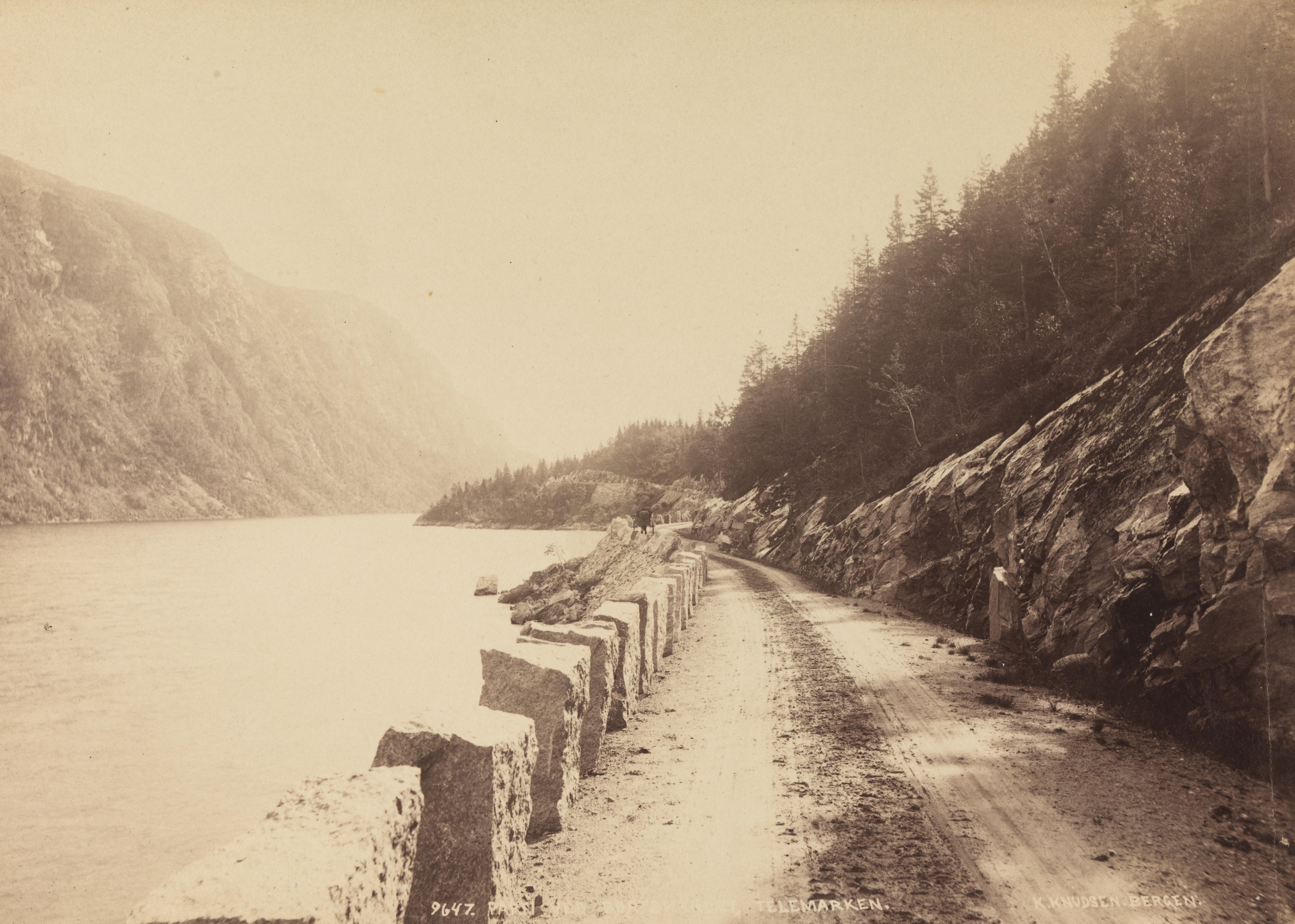 Bildet er hentet fra Nasjonalbibliotekets bildesamling Børtevatn, Sauherad, Telemark